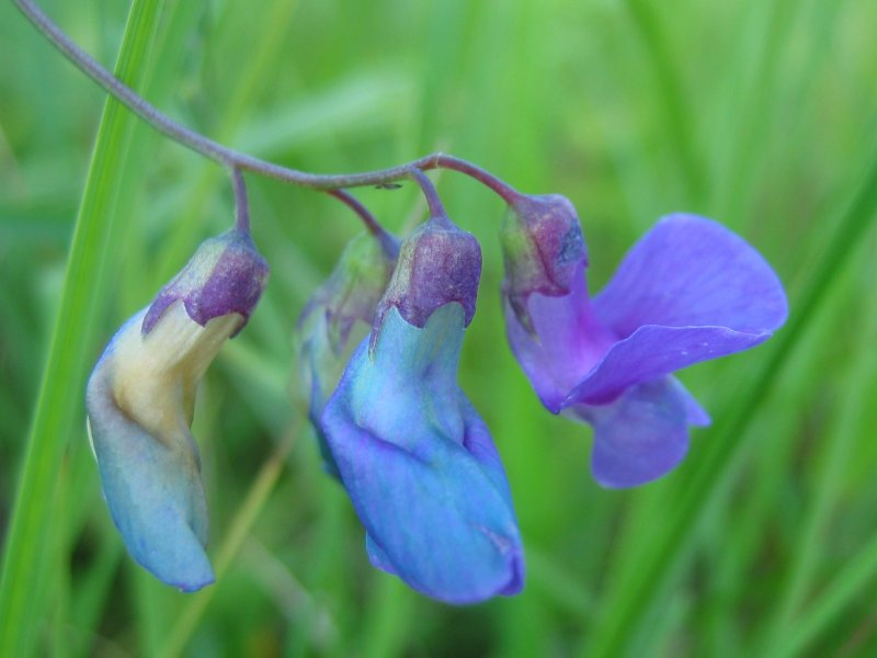 Lathyrus palustris Sumpf-Platterbse, Müritz-Gebiet